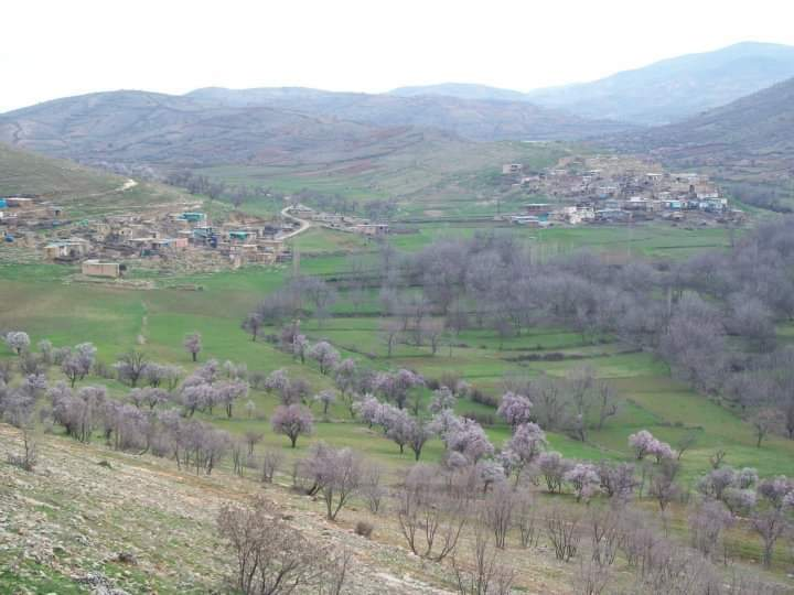 Gercüş Kömürcü Kış